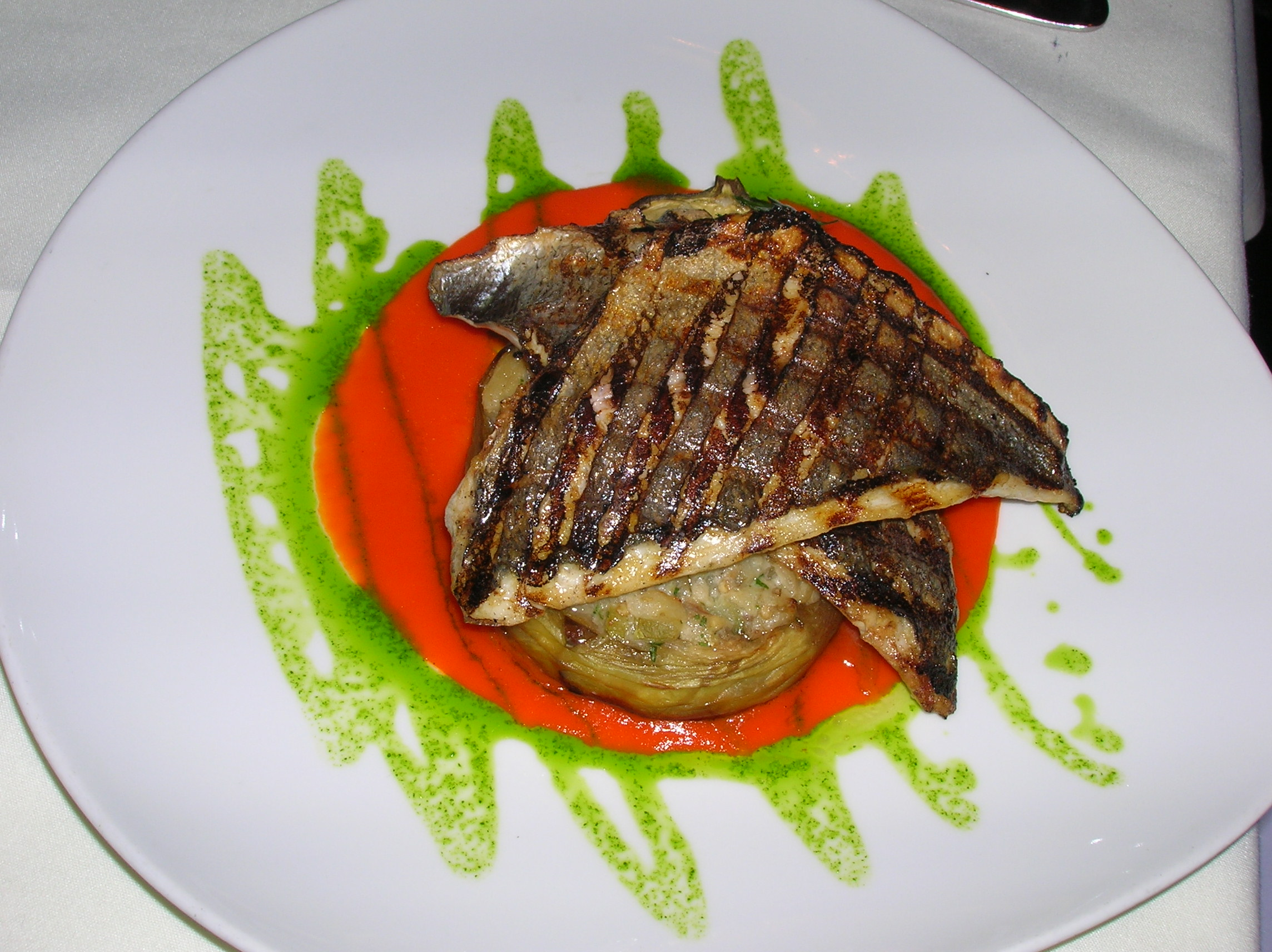 Sea Bream Fillet in Chloelys